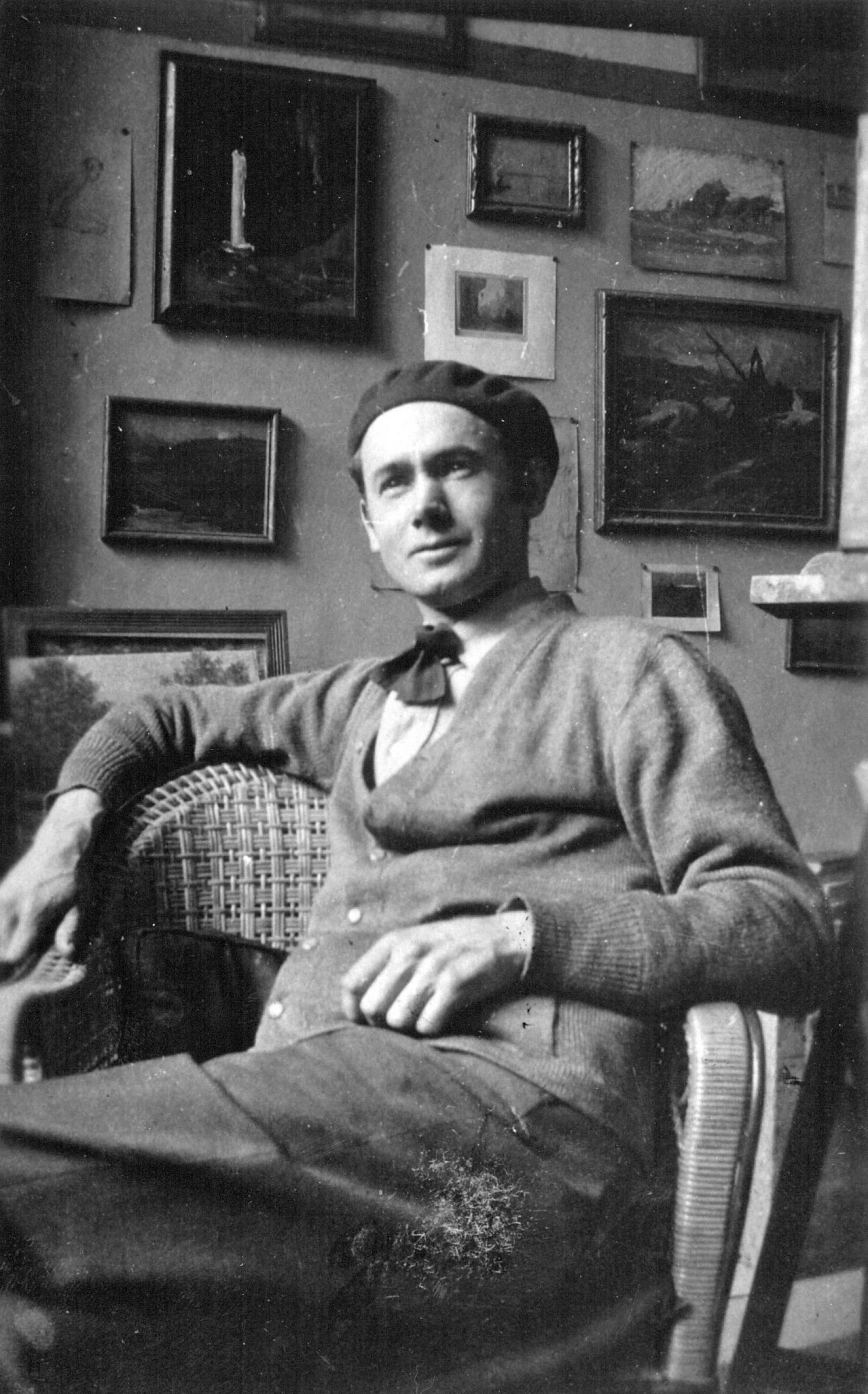 Rodophe Duguay dans son atelier à Paris en 1925